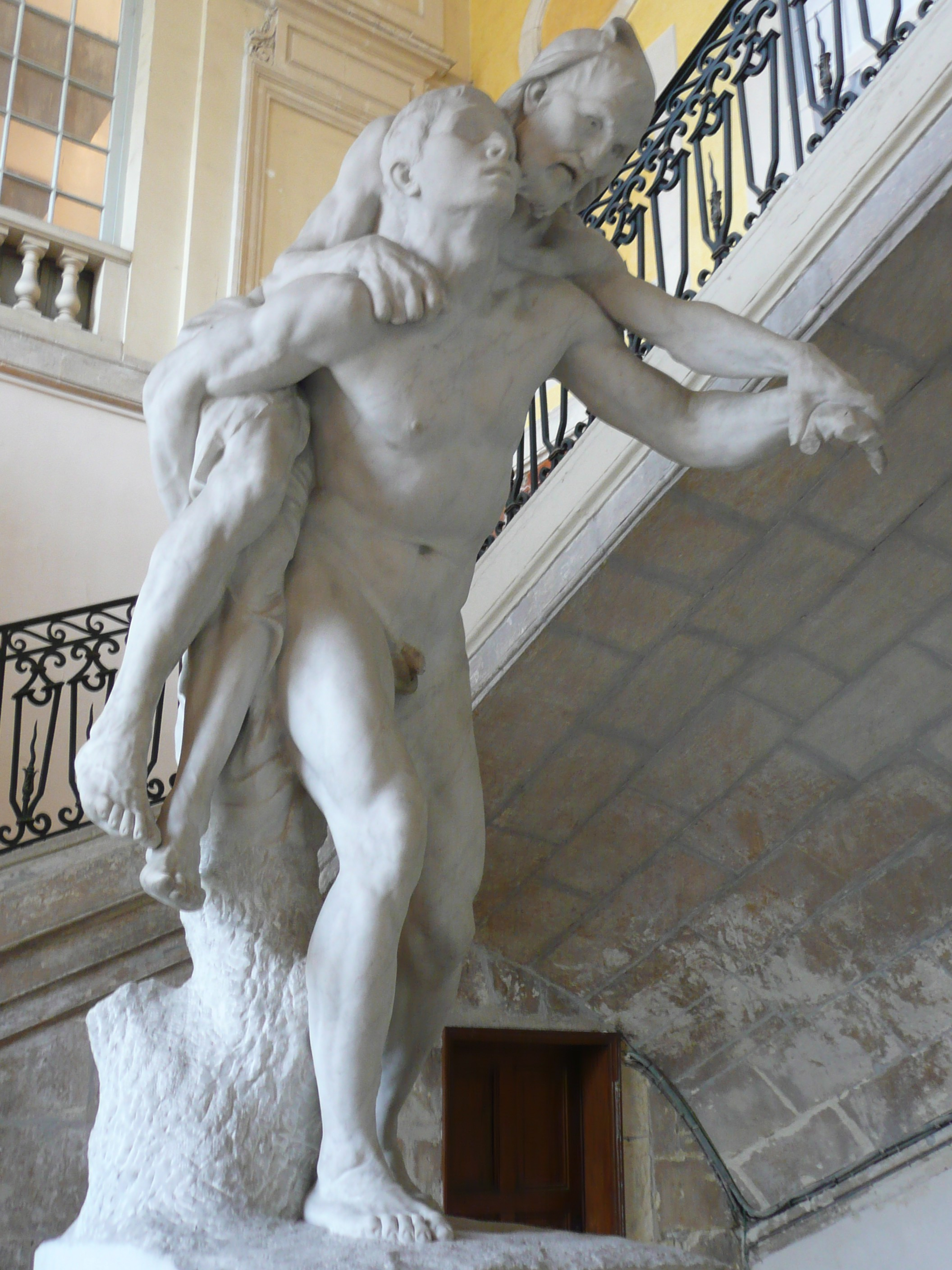 Arles (Bouches-du-Rhône, France), palais archiépiscopal, au rez-de-chaussée de l'entrée sud des appartements de l'archevêque, l'Aveugle et le Paralytique du sculpteur arlésien Jean Turcan (1846-1895).